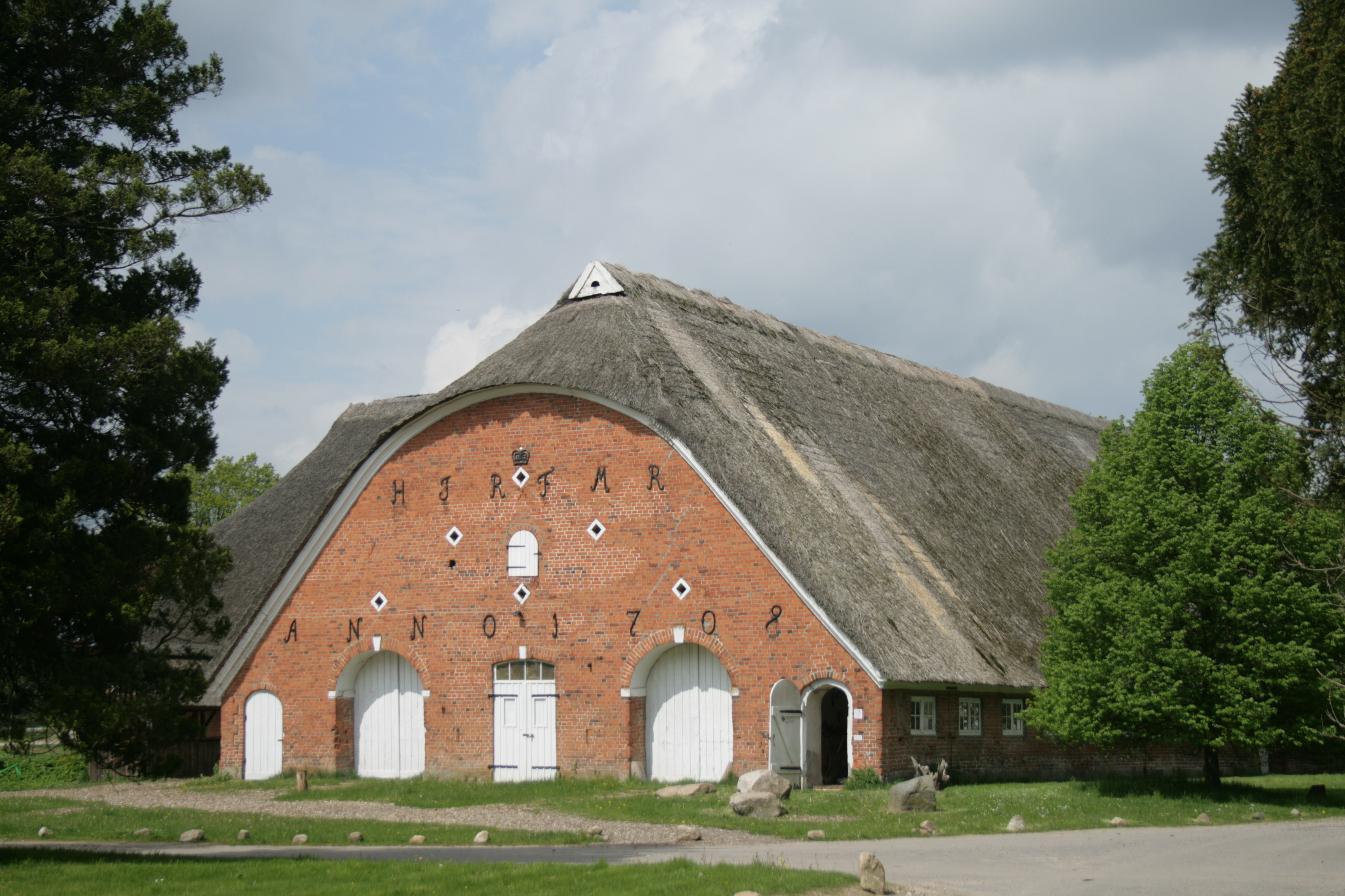 Kuhhaus des Guts Bossee in der Gemeinde Westensee (Kreis Rendsburg-Eckernförde) (Denkmalnr. 1/4)This is a photograph of an architectural monument.It is on the list of cultural monuments of Westensee